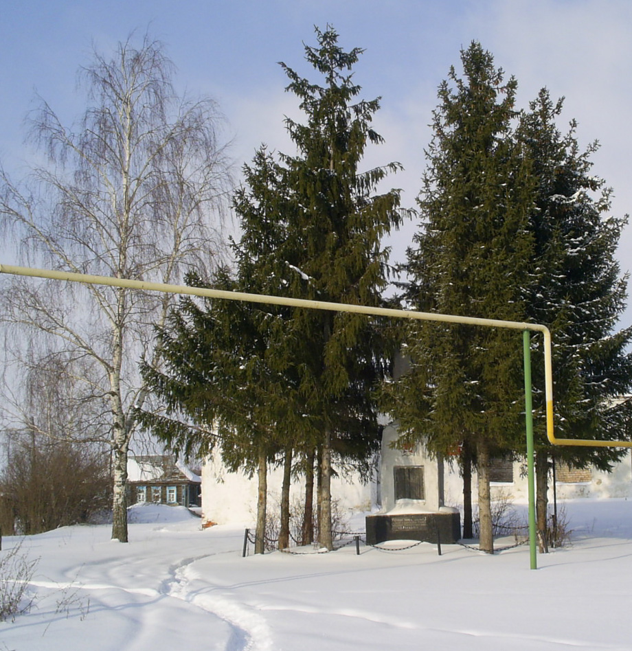 Мемориал погибшим в Великой Отечественной войне в селе Ожгибовка (Пильнинский район Нижегородской области, Россия).